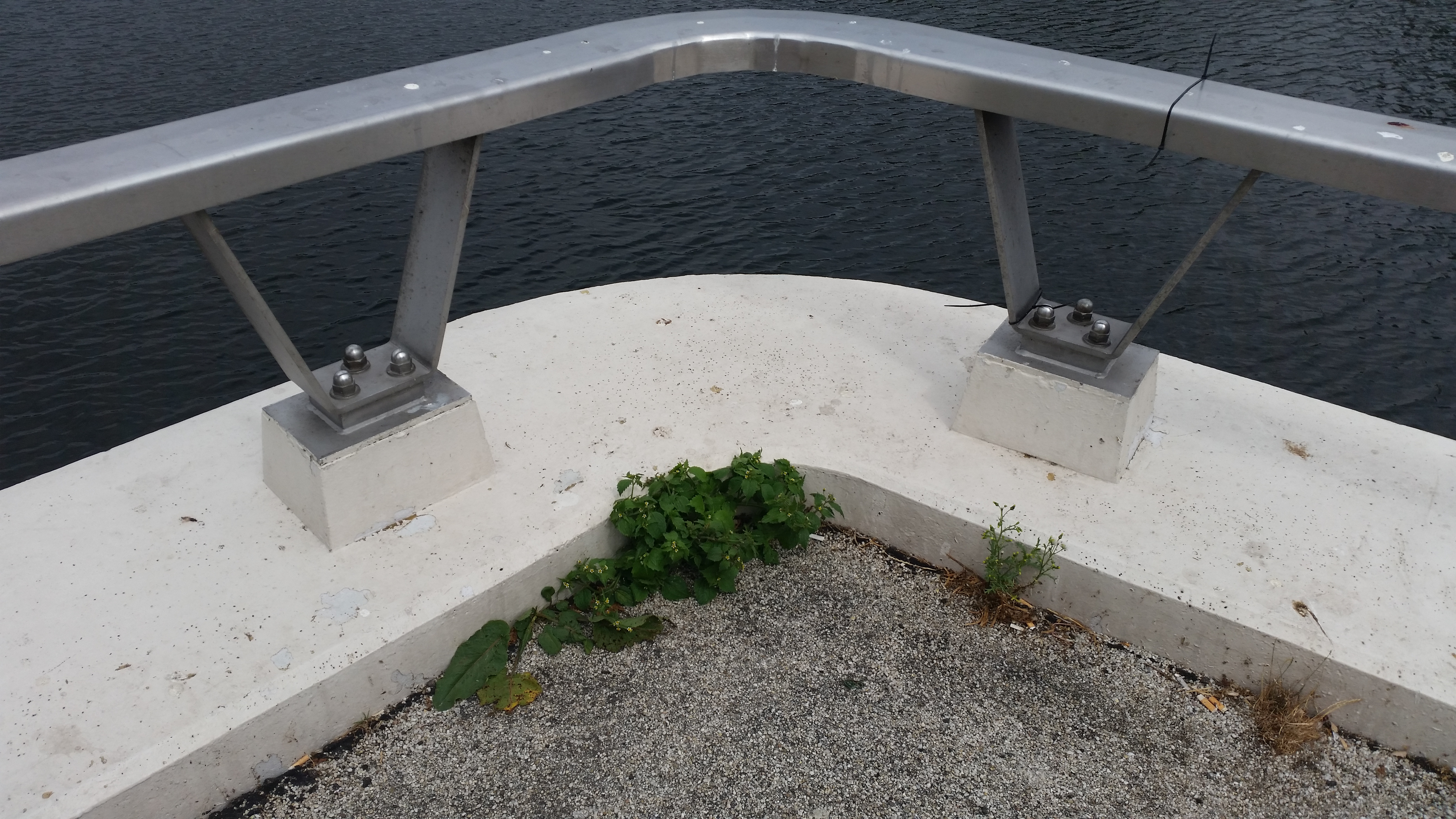 Brug 607, Conny Van Rietschotenbrug, detail van leuning aan de kant van de Sloterplas